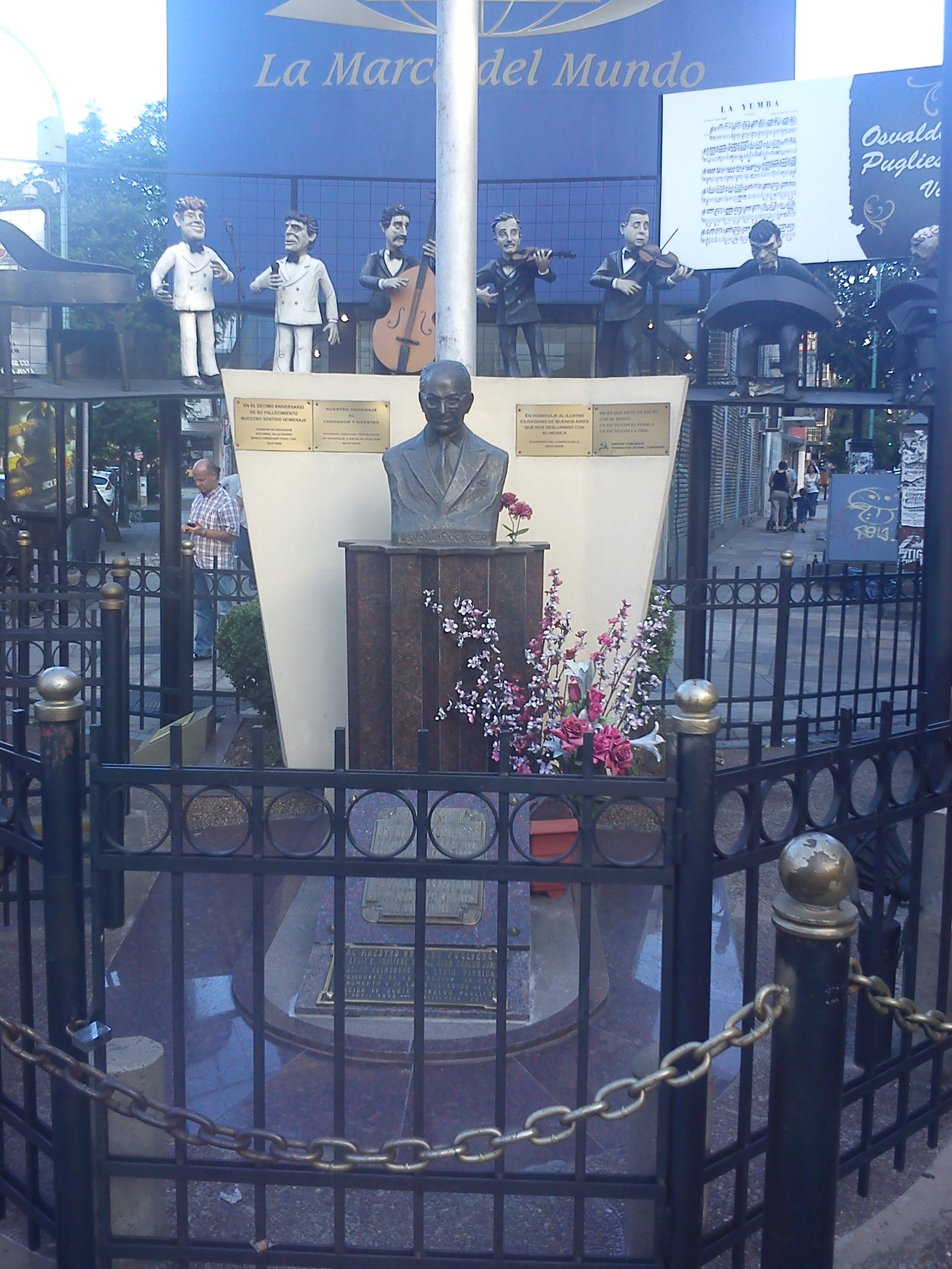 En memoria de Osvaldo Pugliese